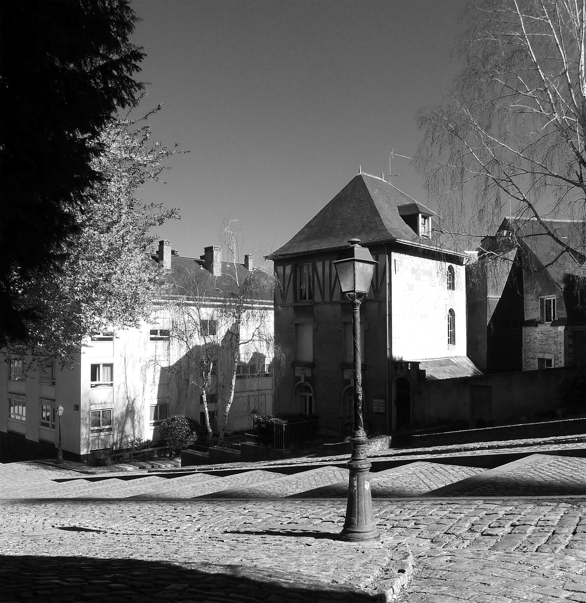 Montée Saint-Maurice - Angers (France)